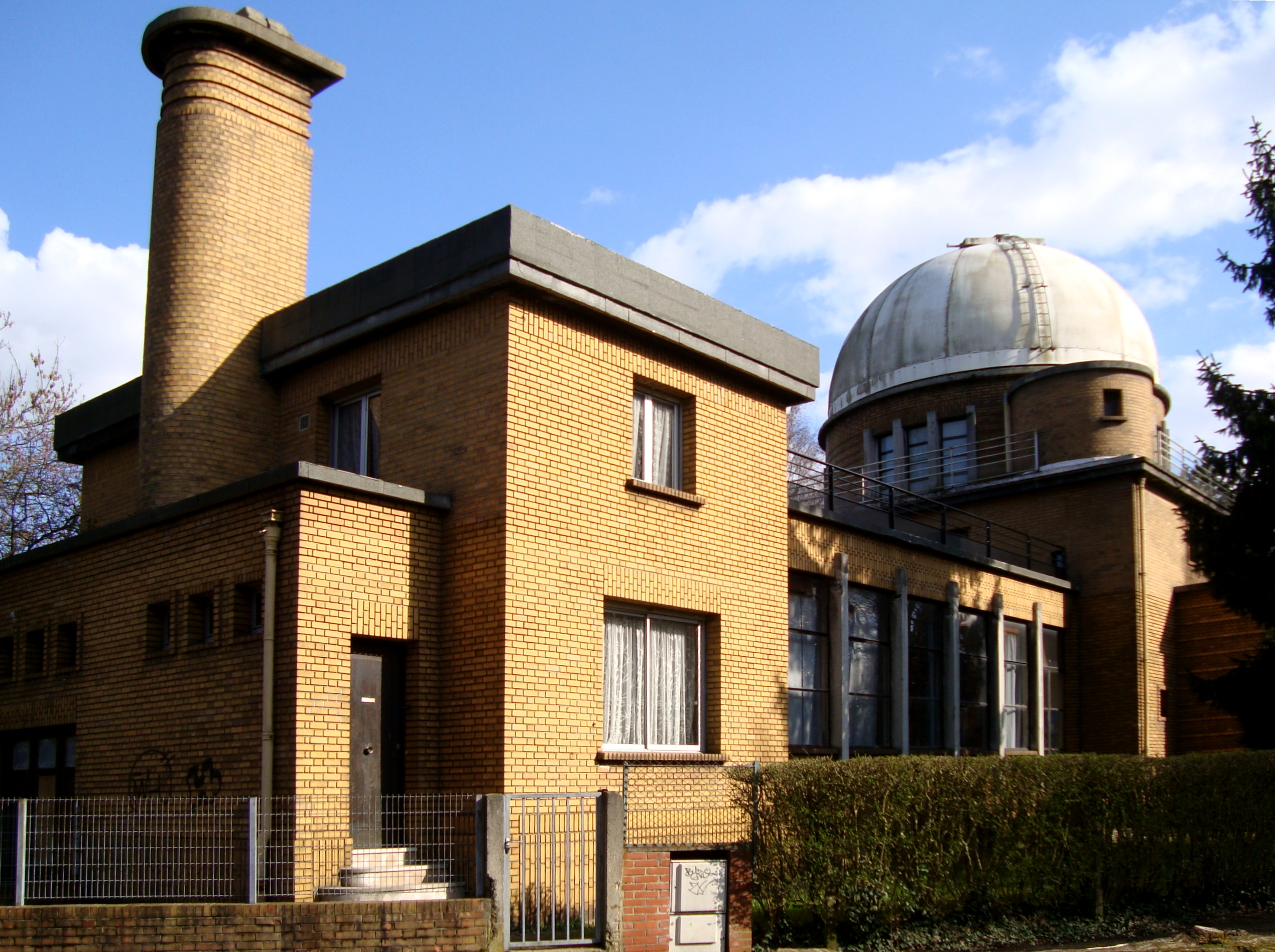 L'observatoire de Lille (Nord) inauguré en 1934. Il abrite une lunette de 325 mm de diamètre et de 6 m de focale équipée au foyer d'une caméra CCD HiSys22.